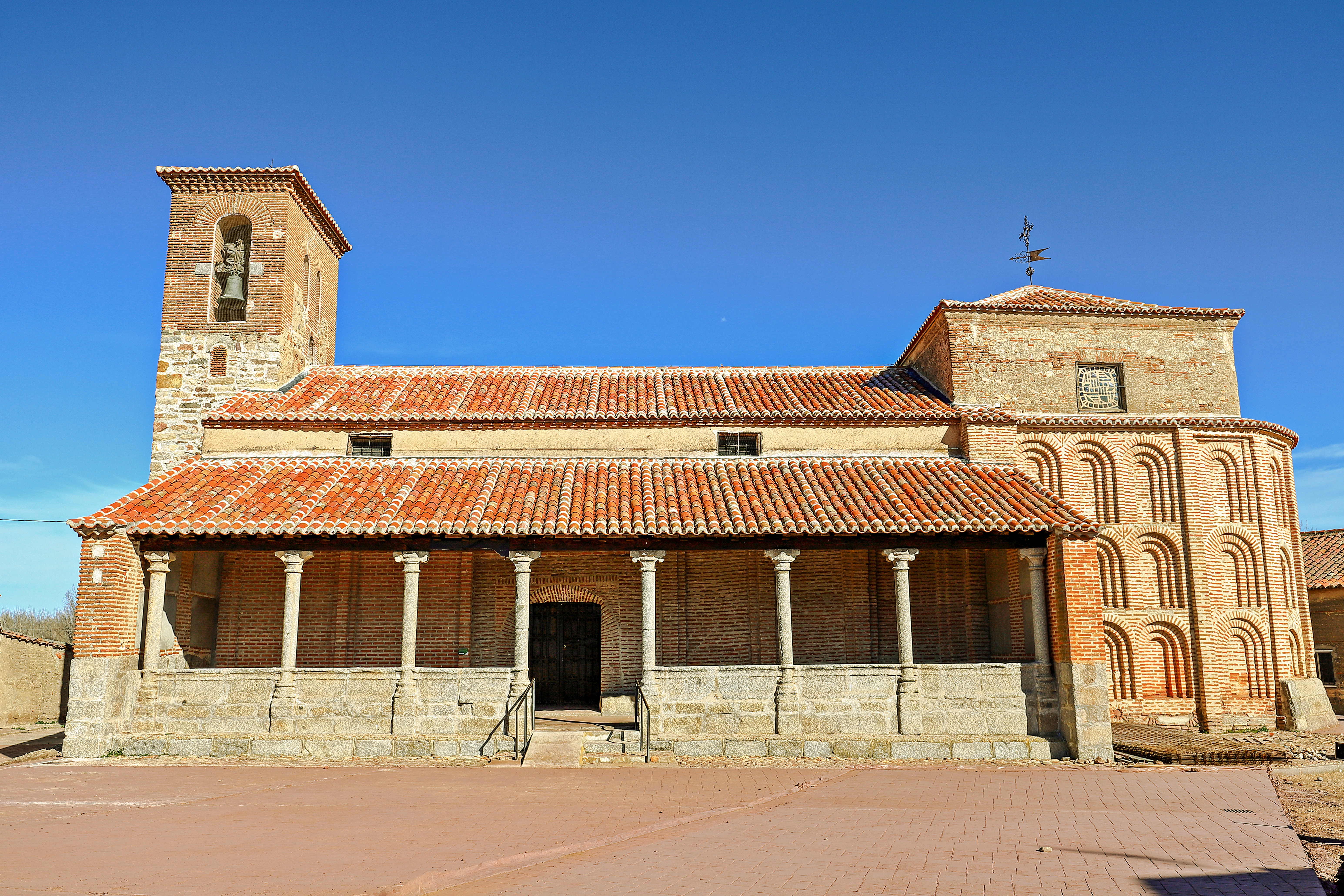 Gajates es un municipio de la comarca Tierra de Alba, en la provincia de Salamanca.